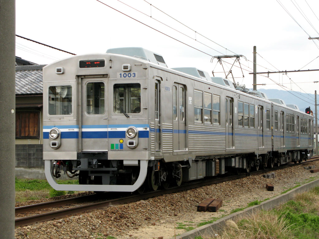 水間鉄道1000形電車（森-三ツ松間にて）